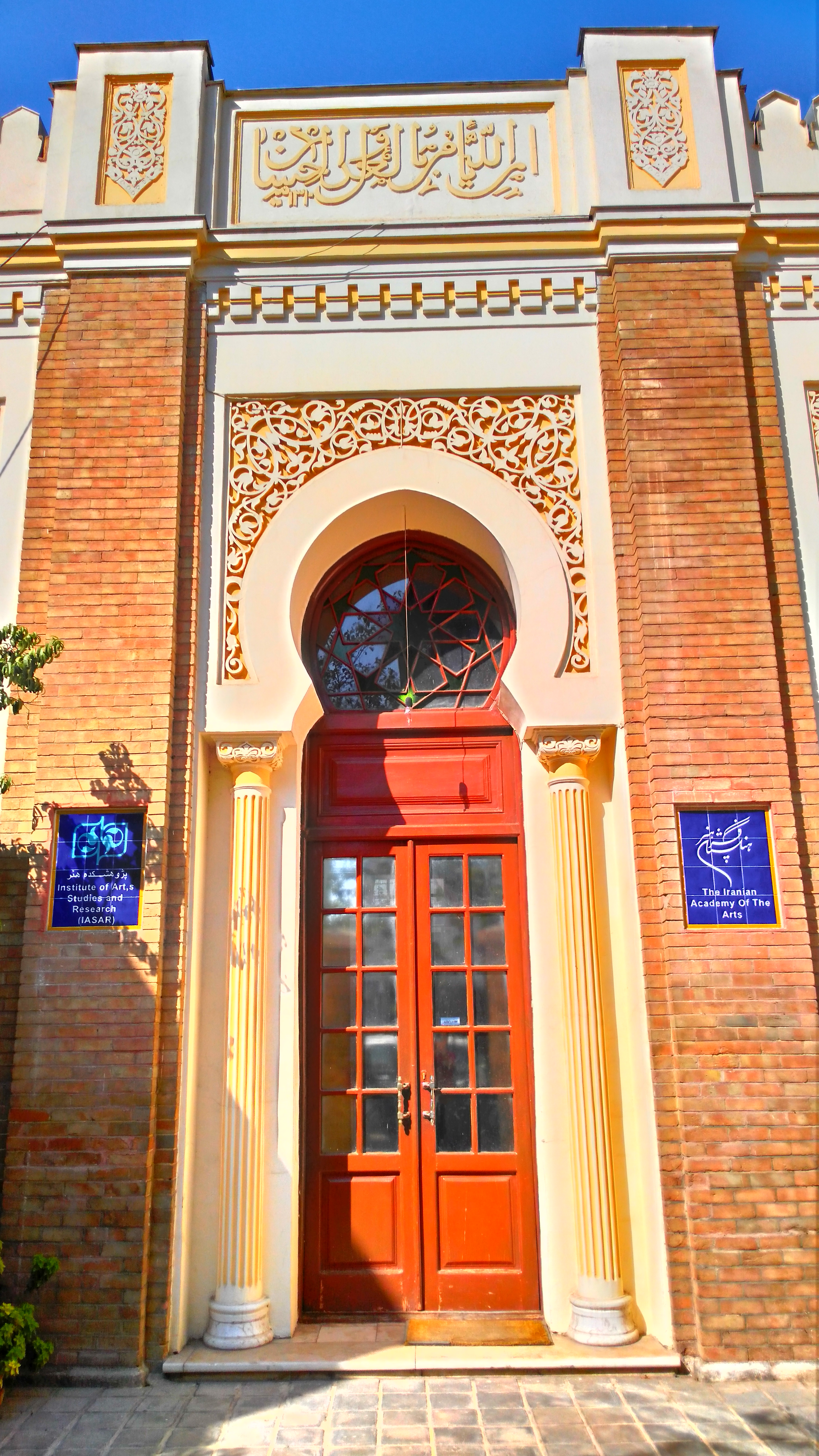 خانه پروفسور عدل